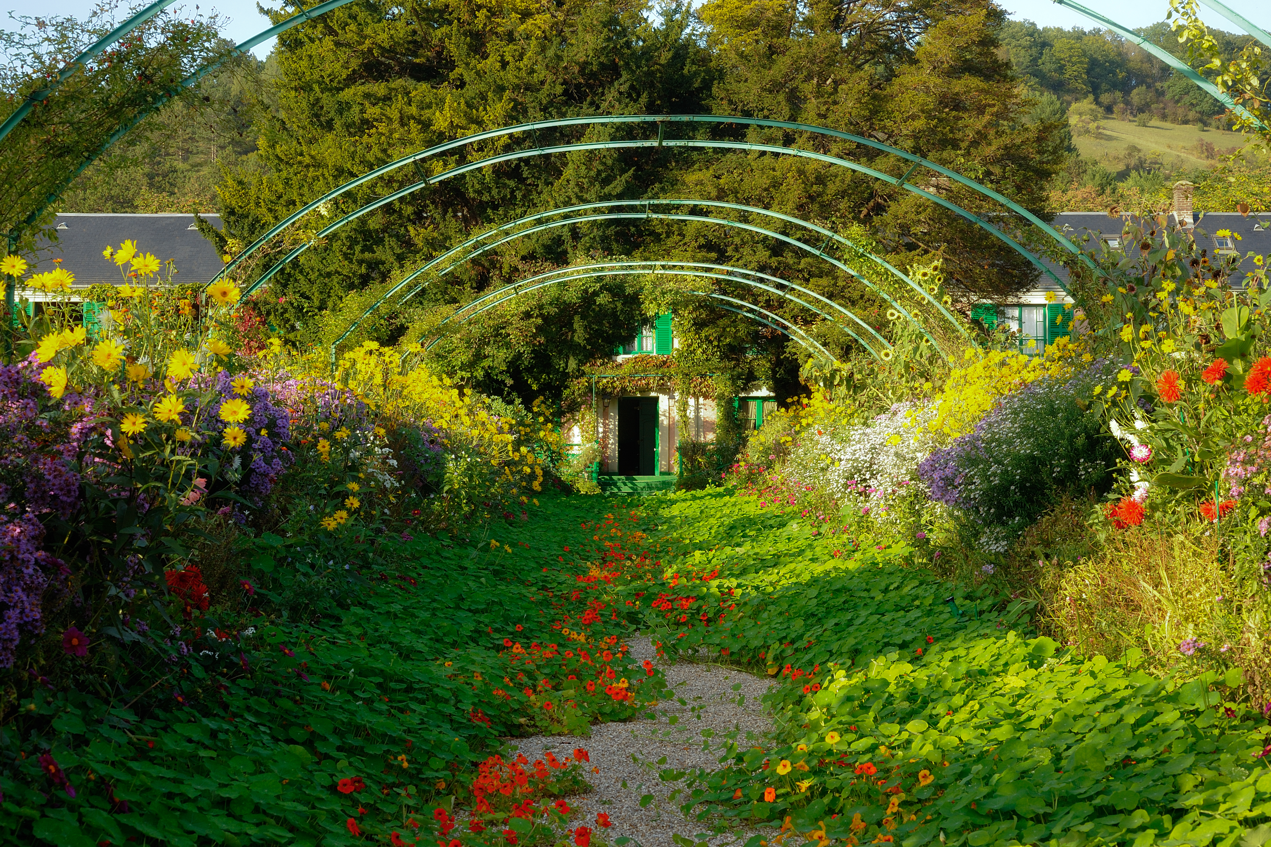 Capucines en fleurs dans l'allée centrale du Clos Normand, Jardin Claude Monet, Fondation Claude Monet, Giverny, Eure, France.